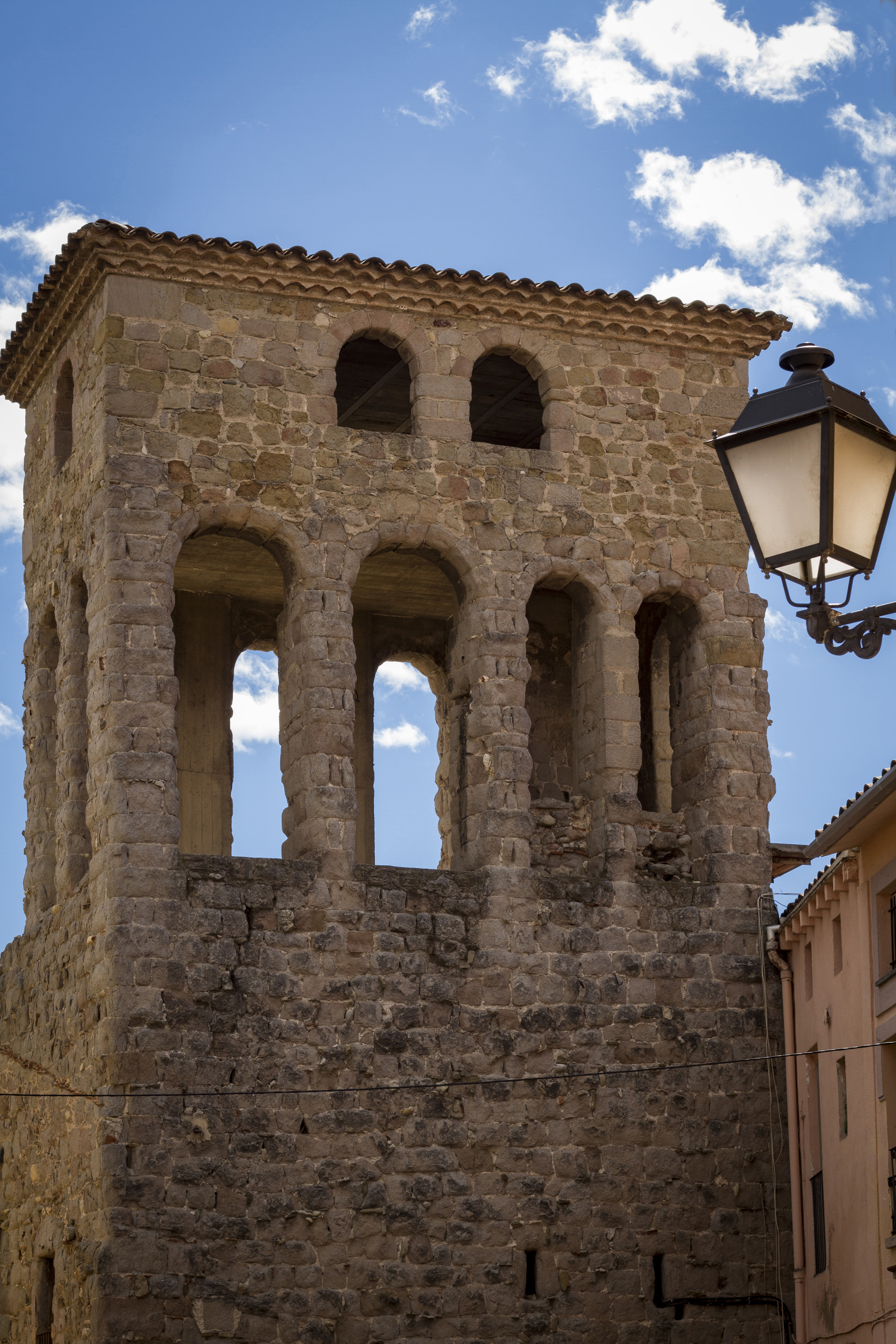 Campanar gòtic de l'església vella de Gironella pertanyent al segle XIII